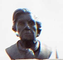 Cora Coralina